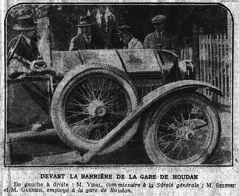 Le quotidien Le Matin annonce le 1er juillet 1923 la poursuite de l'enquête sur l'affaire Seznec avec le déplacement du commissaire Vidal à Dreux et à Houdan. Sur l'illustration, de gauche à droite : Vidal, Guillaume Seznec, un employé de la gare de Houdans et enfin l'inspecteur Pierre Bonny.